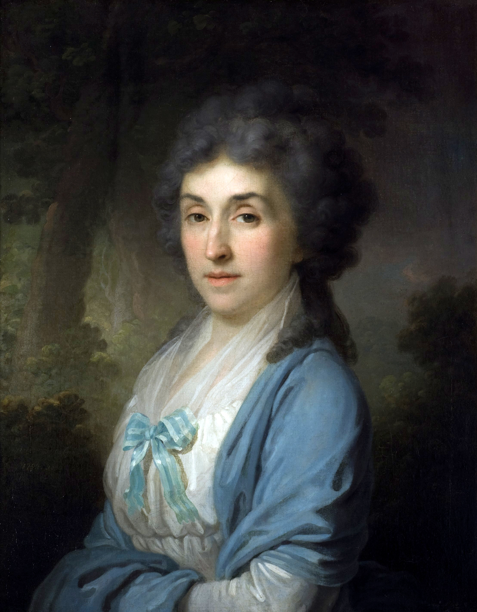 Екатерина Александровна Новосильцева (1755-1842), урожд. Торсукова, жена П.И. Новосильцева (1744-1805), действительного статского советника, сенатора и генерал-провиантмейстера. Многие годы принимала участие в судьбе Боровиковского.